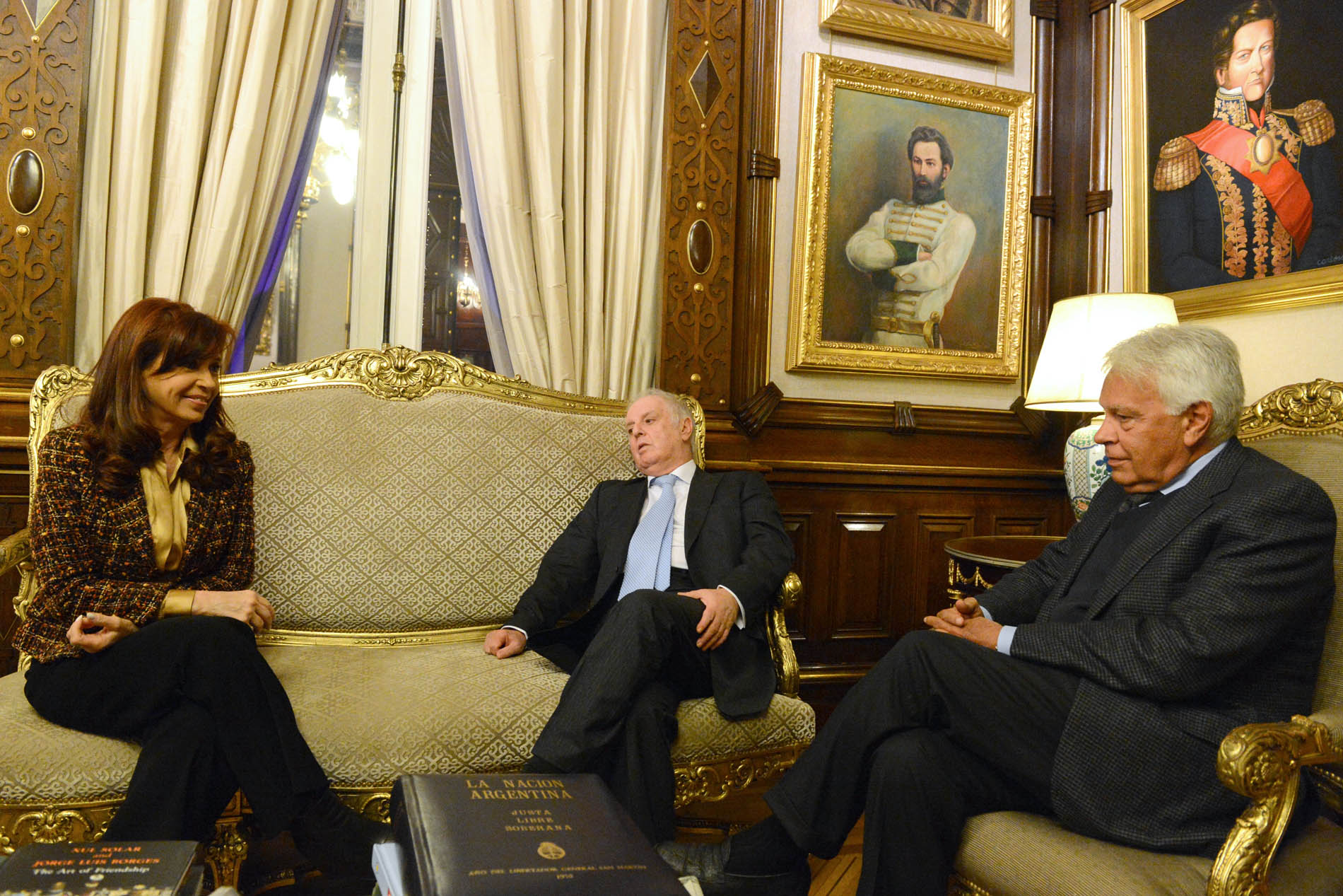 La presidenta Cristina Fernández recibe al Daniel Barenboim y el líder del PSOE, Felipe González